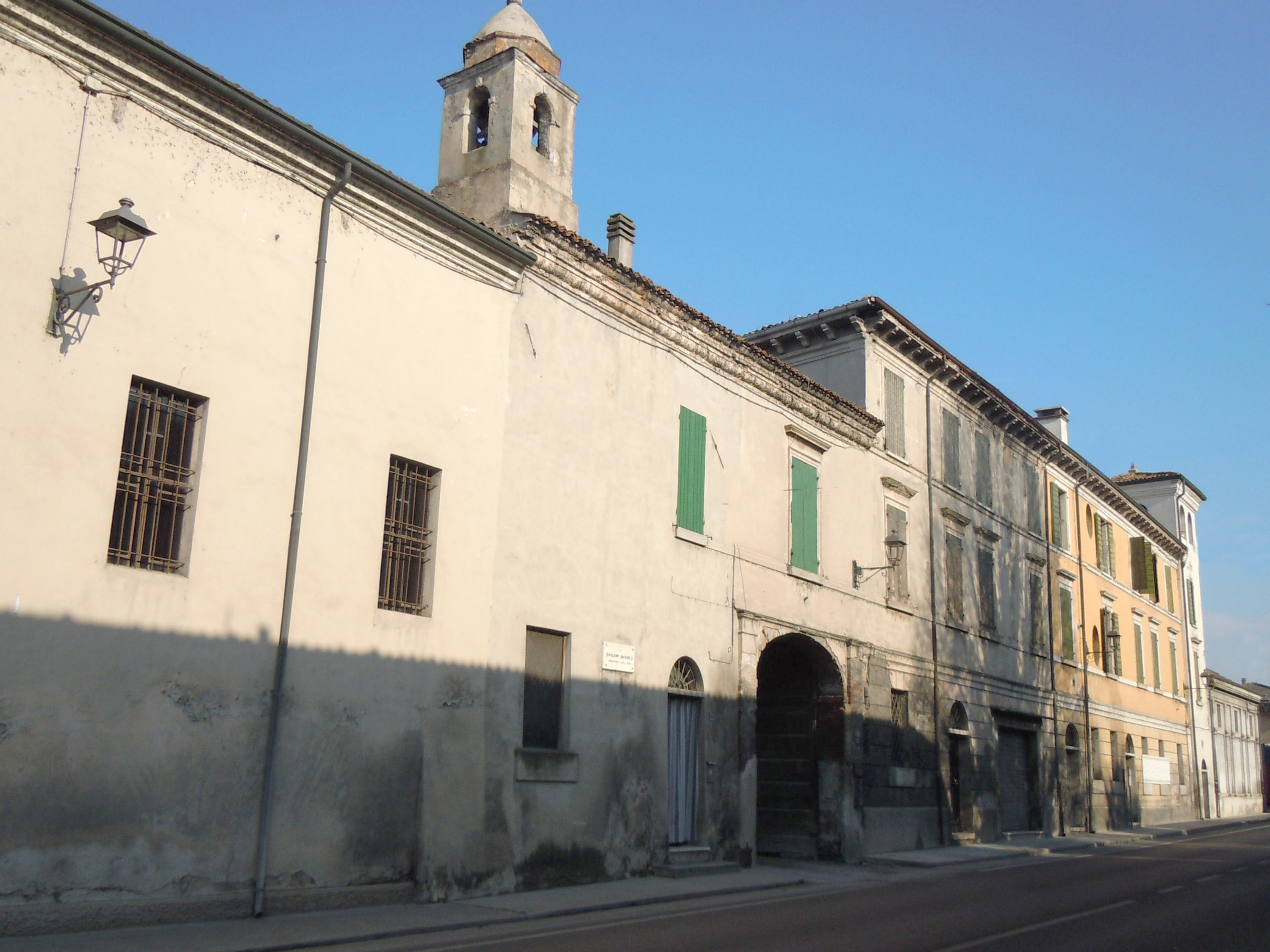 Marengo, panorama.